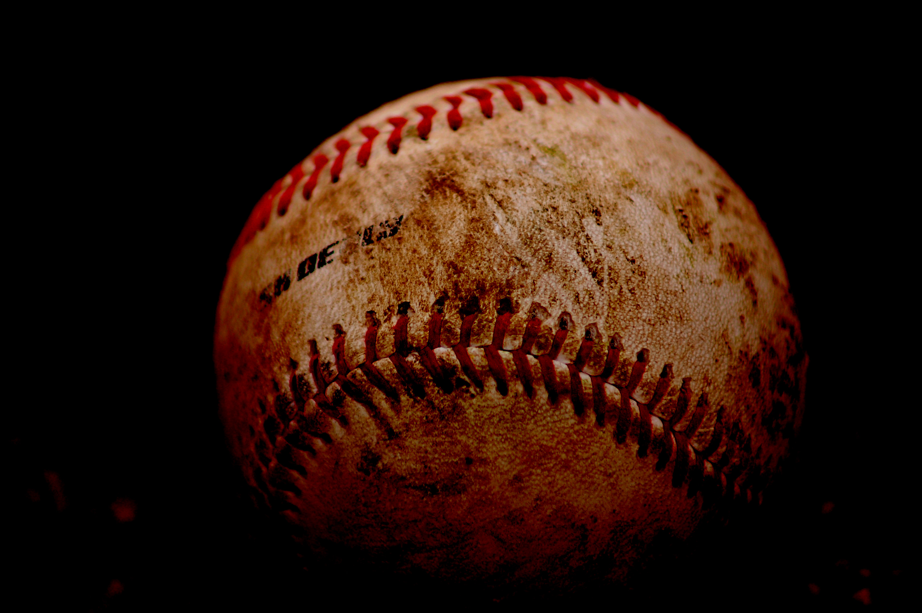 A baseball